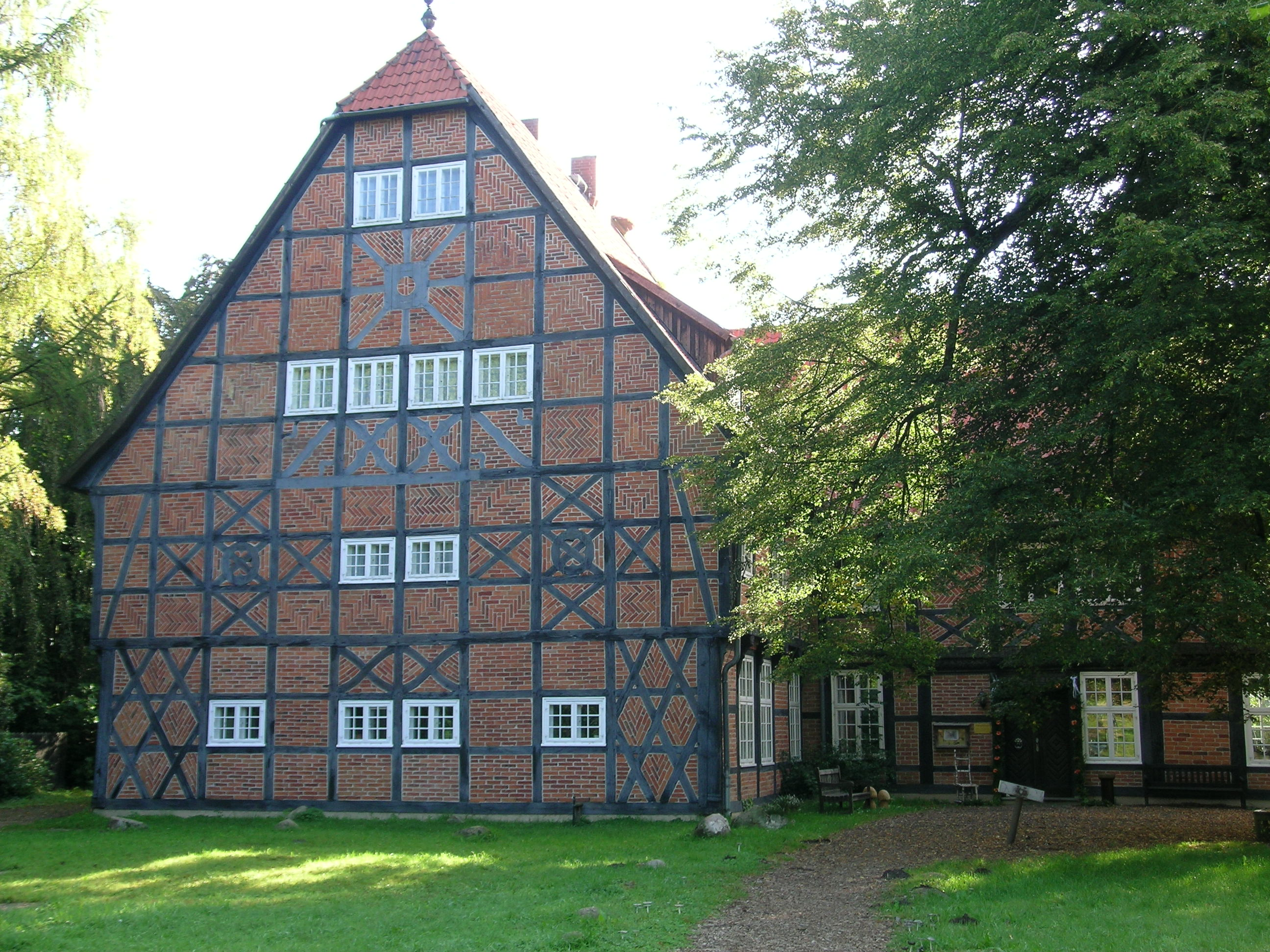 Herrenhaus Gut Sunder Gut Sunder Manor House, nr. Meißendorf, Lower Saxony, Germany.